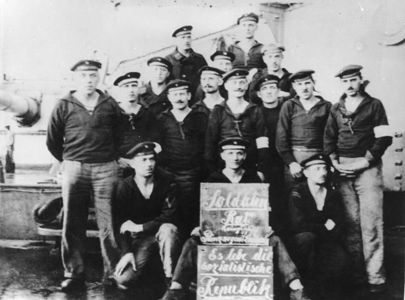 Zentralbild/IML Novemberrevolution in Deutschland Mit dem Aufstand der Matrosen und Arbeiter am 3.11.1918 in Kiel beginnt die Novemberrevolution. Am 6. November greift die revolutionäre Bewegung auf Wilhelmshaven über. UBz. den Soldatenrat des Linienschiffes "Prinzregent Luitpold".